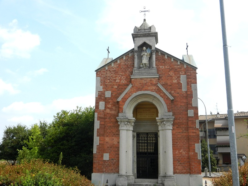 Basiano - Cappella dei Caduti